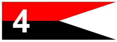 WZÓR GRAFICZNY PROPORCZYKA NA BERET 4. BATALIONU INŻYNIERYJNEGO